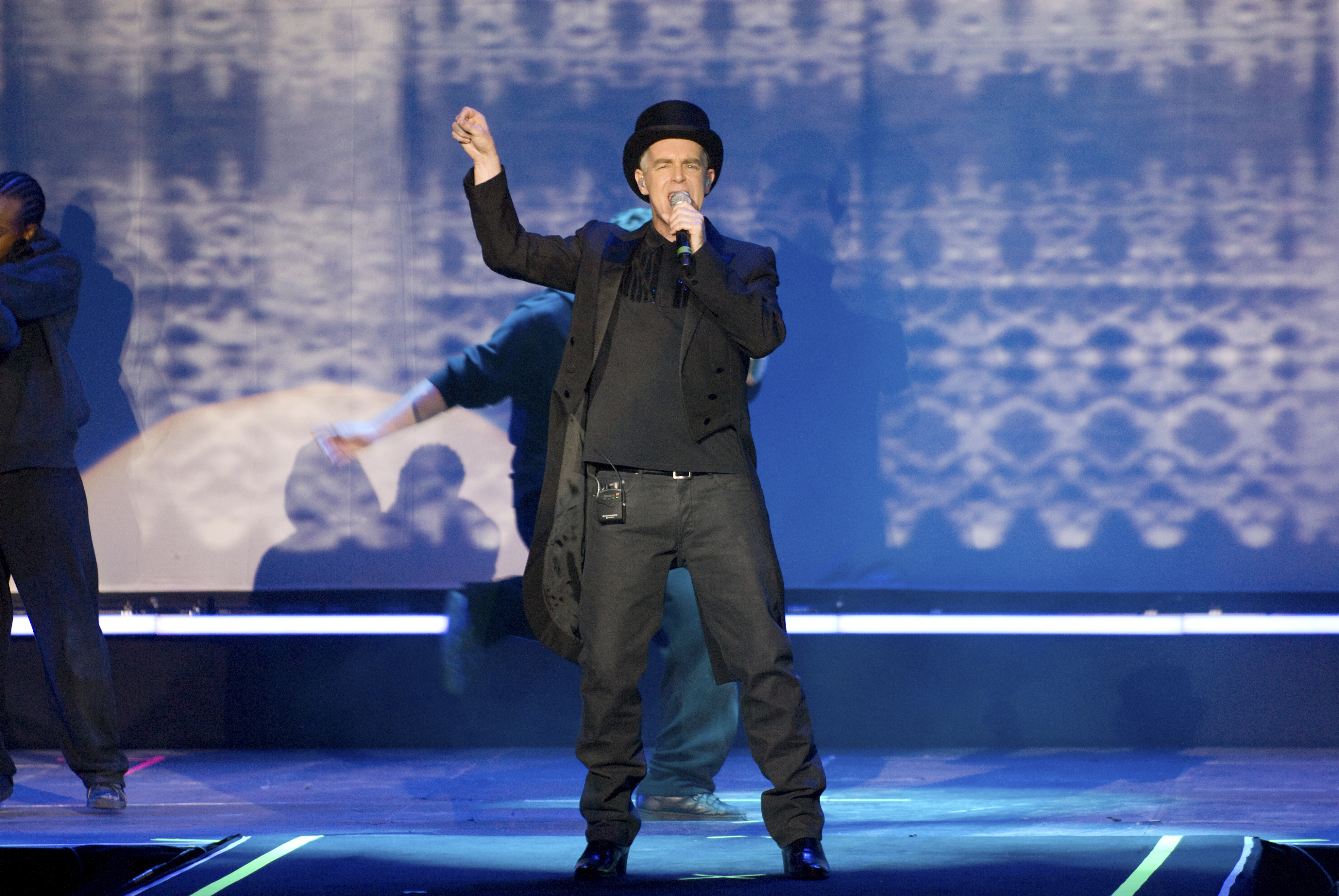 Pet Shop Boys